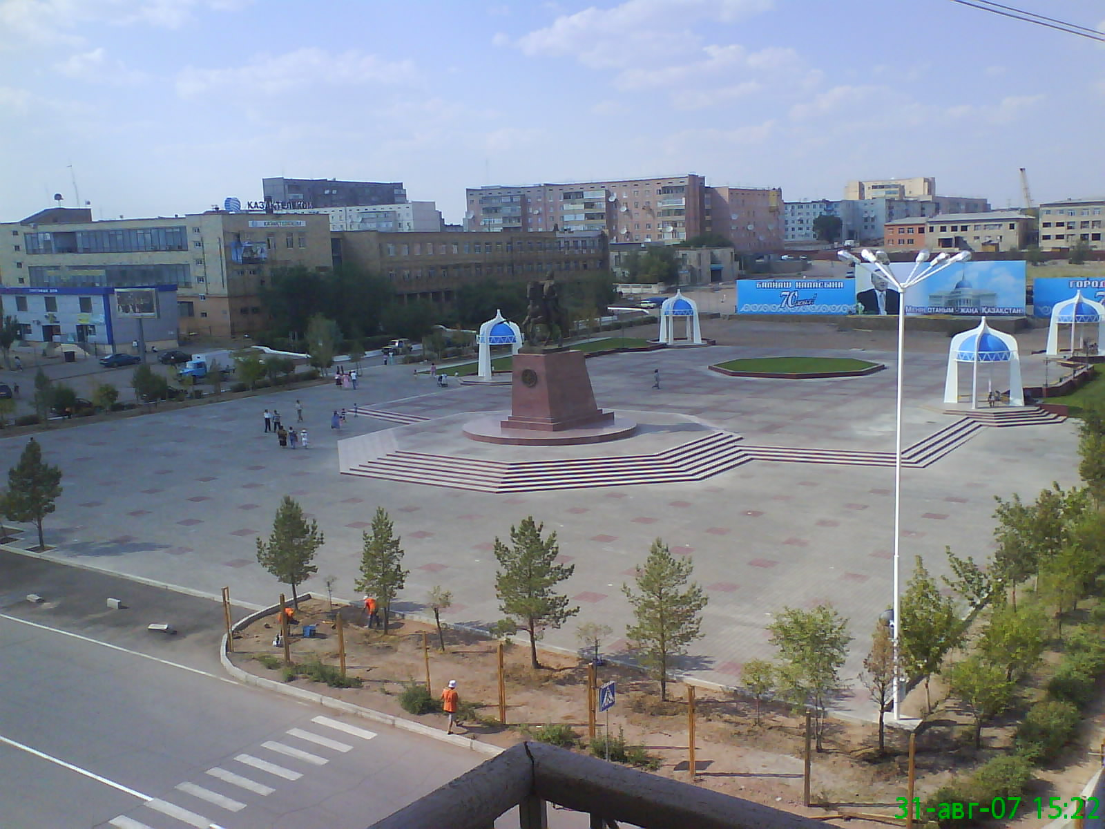 Центр города Балхаш city Balkhash, center.